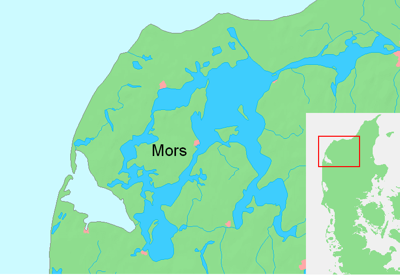 Mors, isle in Danmark